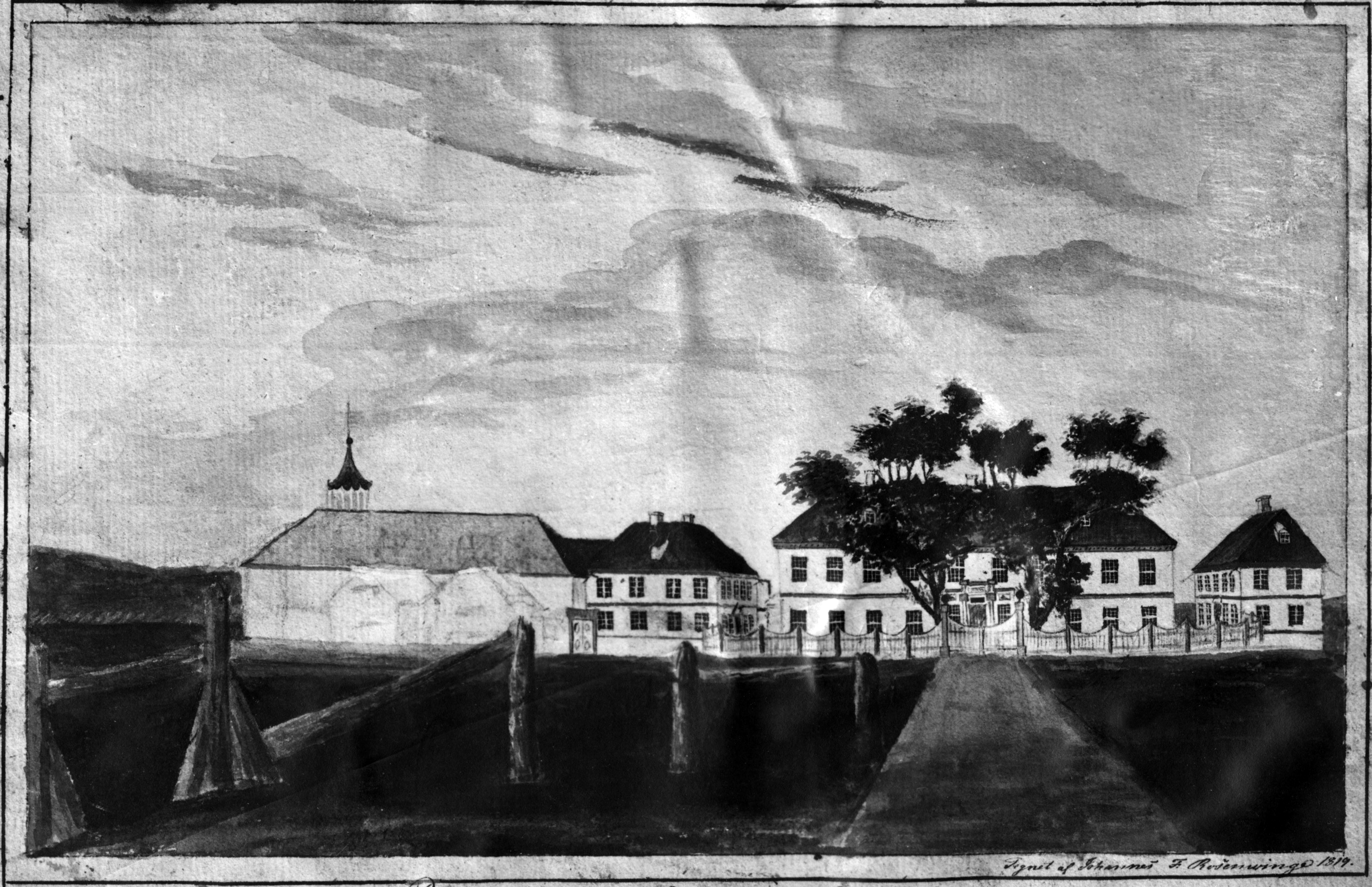 Format: Tegning Dato / Date: 1819 Kunstner / Artist: Johannes Rosenvinge Sted / Place: Trondheim Eier / Owner Institution: Trondheim byarkiv, The Municipal Archives of Trondheim Arkivreferanse / Archive reference: Tor.H41.B31.F2323 Merknad: Lade gård; de norske kongers eldste sete, hvorifra Trondheim ble grunnlagt.